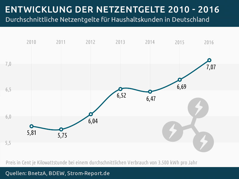 Entwicklung der Netzentgelte (Strom) für Haushaltskunden in Deutschland 2010–2016